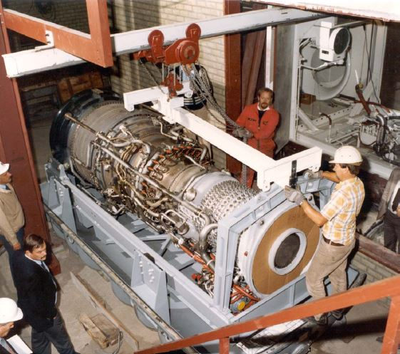 Installatie van de eerste Thomassen-GE LM2500 gasturbine